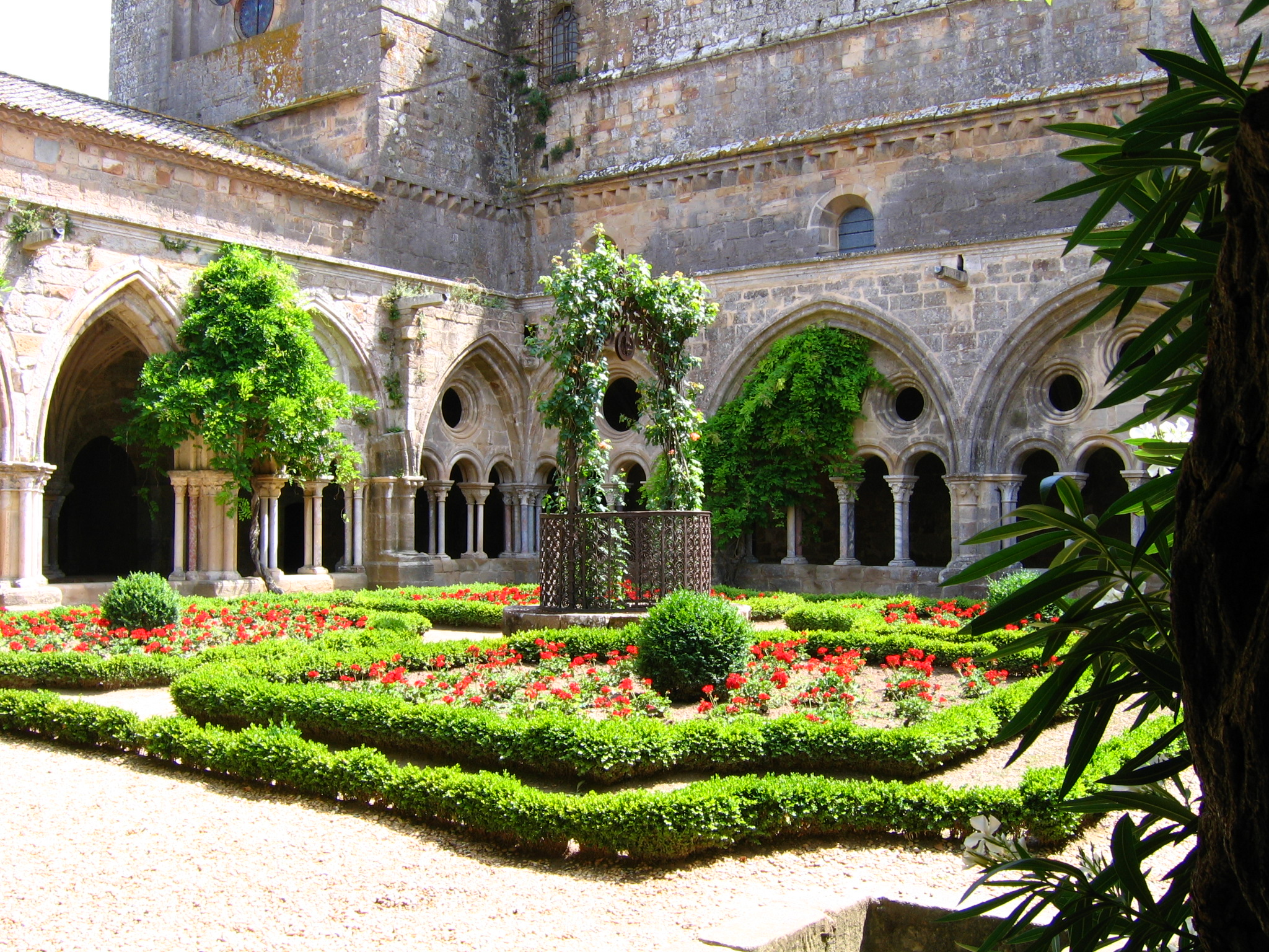 Cloitre de l'Abbaye de Fontfroide (aude, 11) France